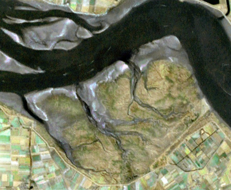 Verdronken Land van Saeftingen.